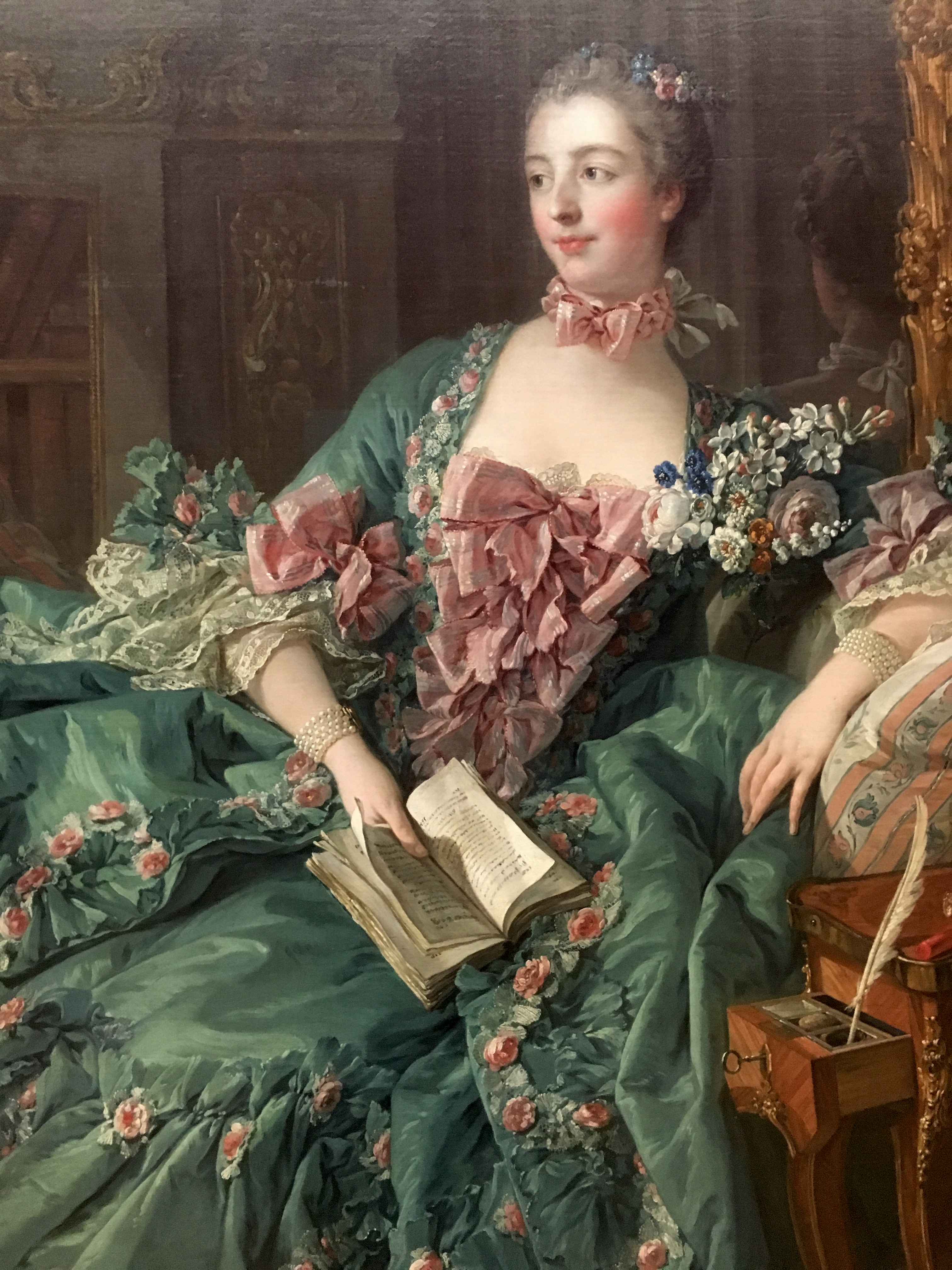 François Boucher. Retrato de Madame de Pompadour. Munich, Alte Pinakothek.